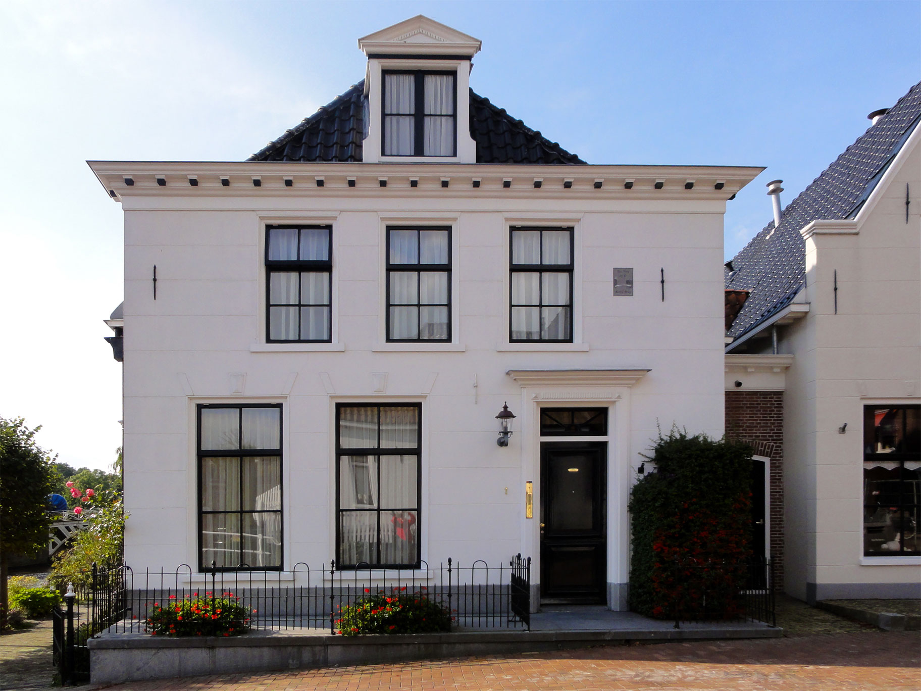 Legeweg 1 Dokkum, rijksmonument